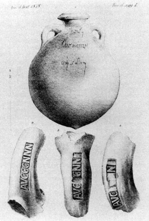 Roman tituli picti from amphorae found at Monte Testaccio, Rome. From H. Dressel, Ricerche sul Monte Testaccio, Annali dell'Instituto di Correspondenza Archeologica [1878], plate L.